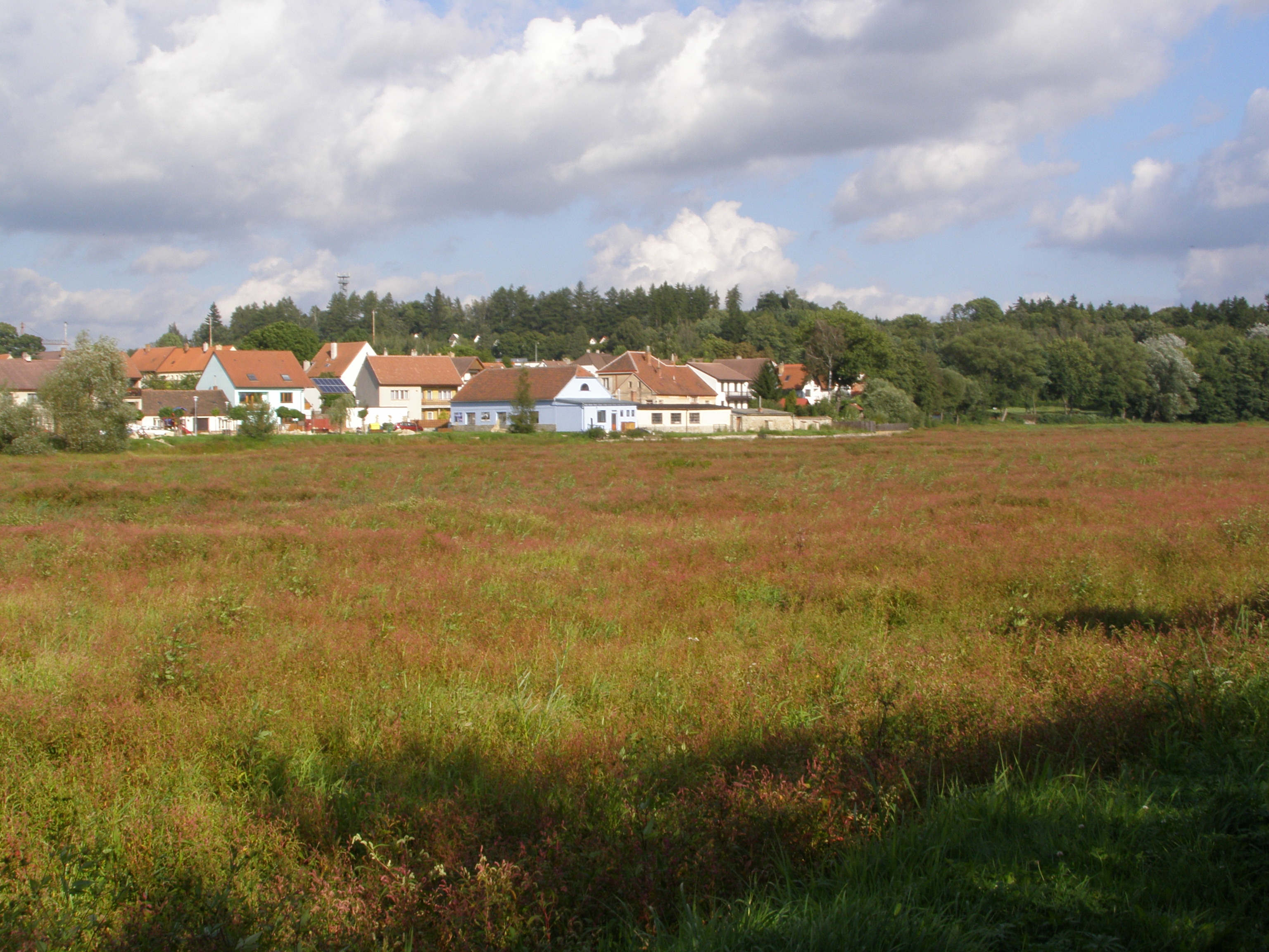 Telč, pohled z břehu Starého Města přes vypuštěný Staroměstský rybník na městskou část Podolí, v pozadí vrchol Oslednice